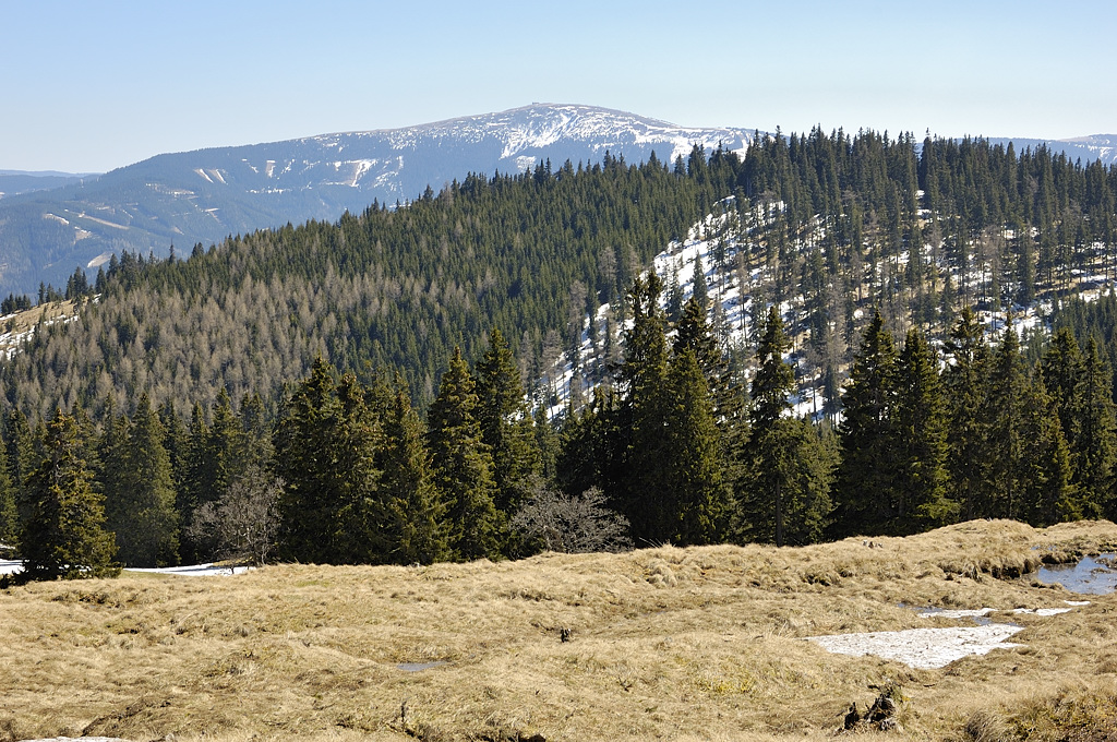 Kampalpe & Stuhleck